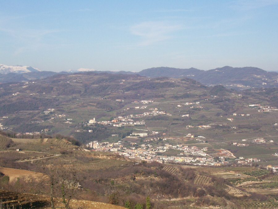 Veduta di parte di San Giovanni Ilarione e Castello